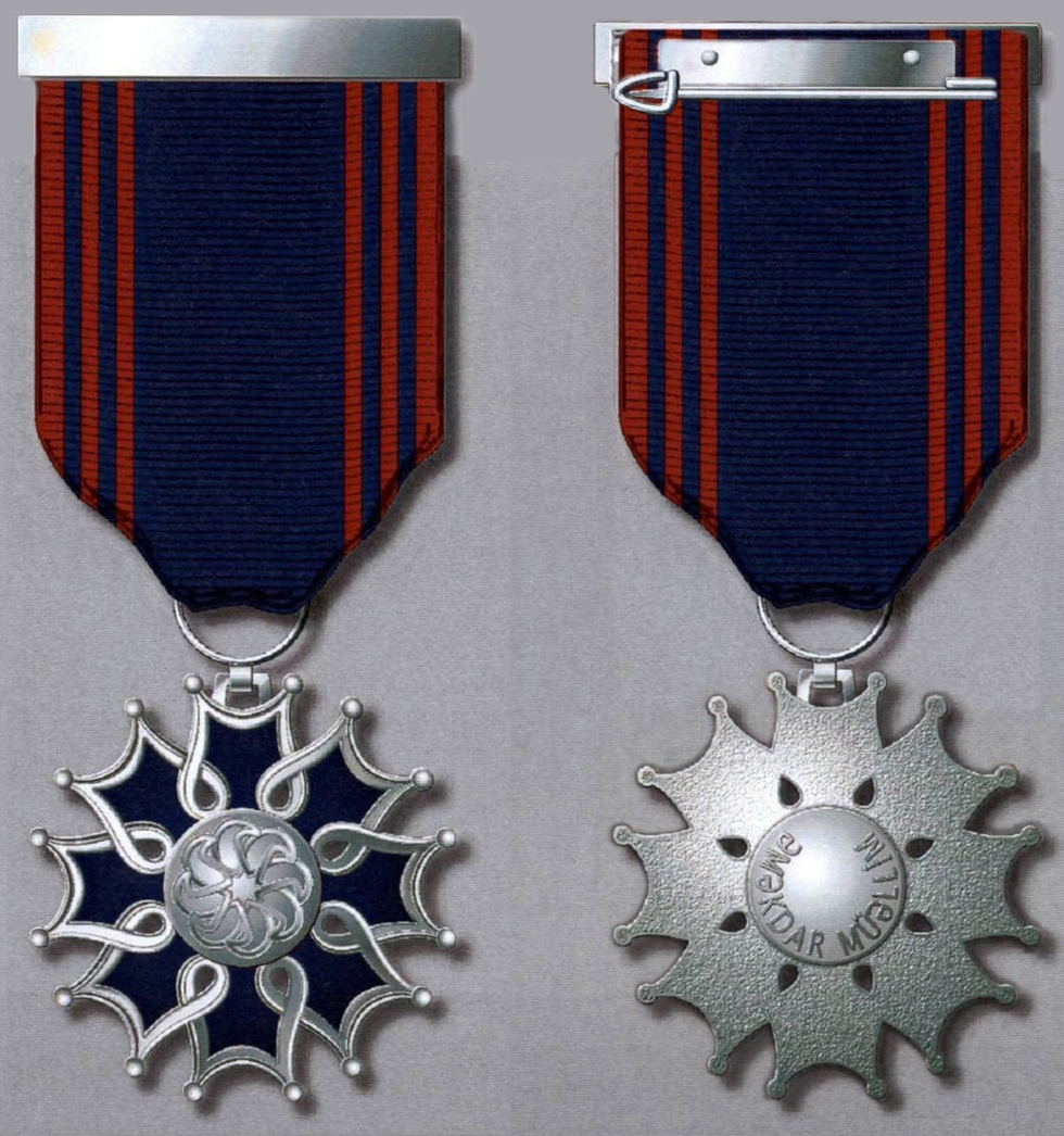 “Əməkdar müəllim” fəxri adının döş nişanı